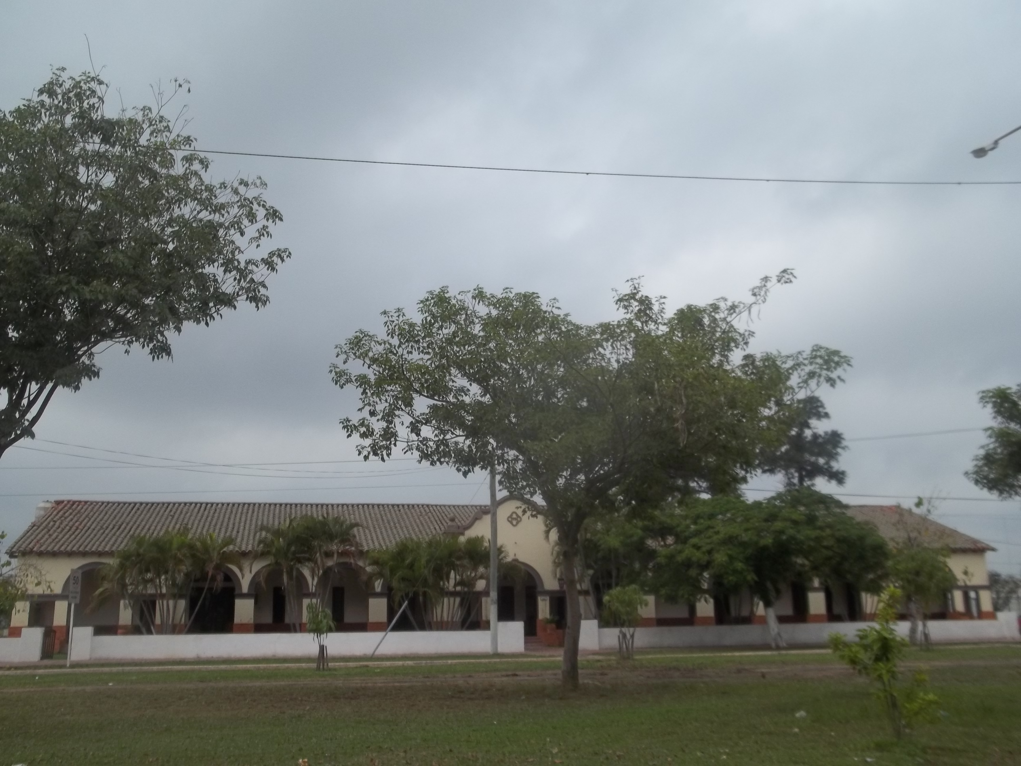 Vista del frente (avenida Las Heras) del acceso a la Unidad Penitenciaria Federal 7 de Resistencia, Argentina.